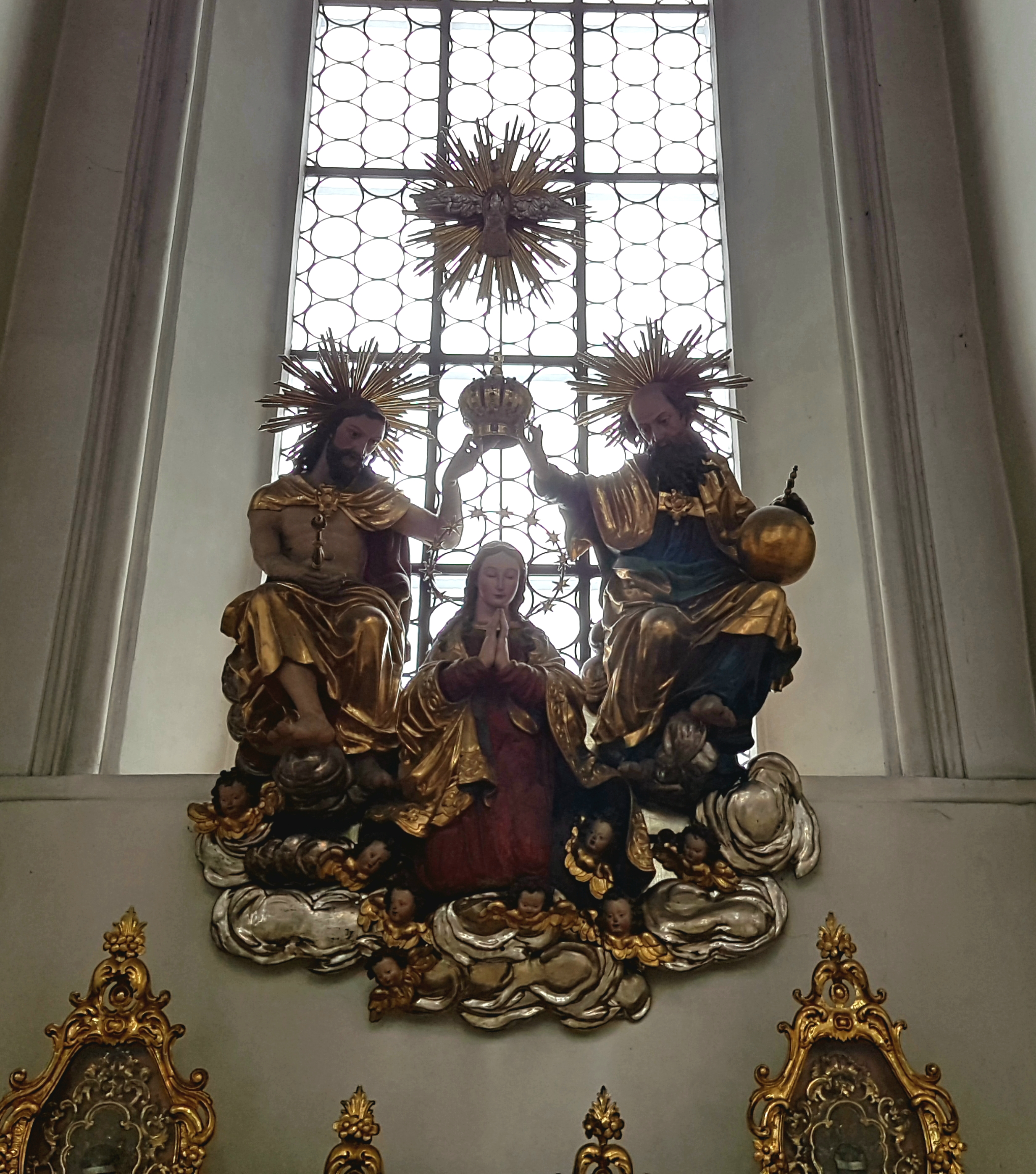 Hl. Geist-Kirche München, Krönung Mariens von 1681